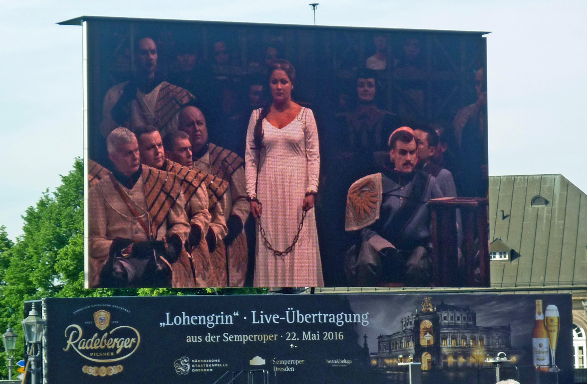 Dresden, Theaterplatz: Lohengrin-Live-Übertragung aus der Semperoper mit Anna Netrebko – Elsas Traumerzählung: „Einsam in trüben Tagen“ (1. Aufzug) mit der Sächsischen Staatskapelle Dresden unter der Leitung von Christian Thielemann